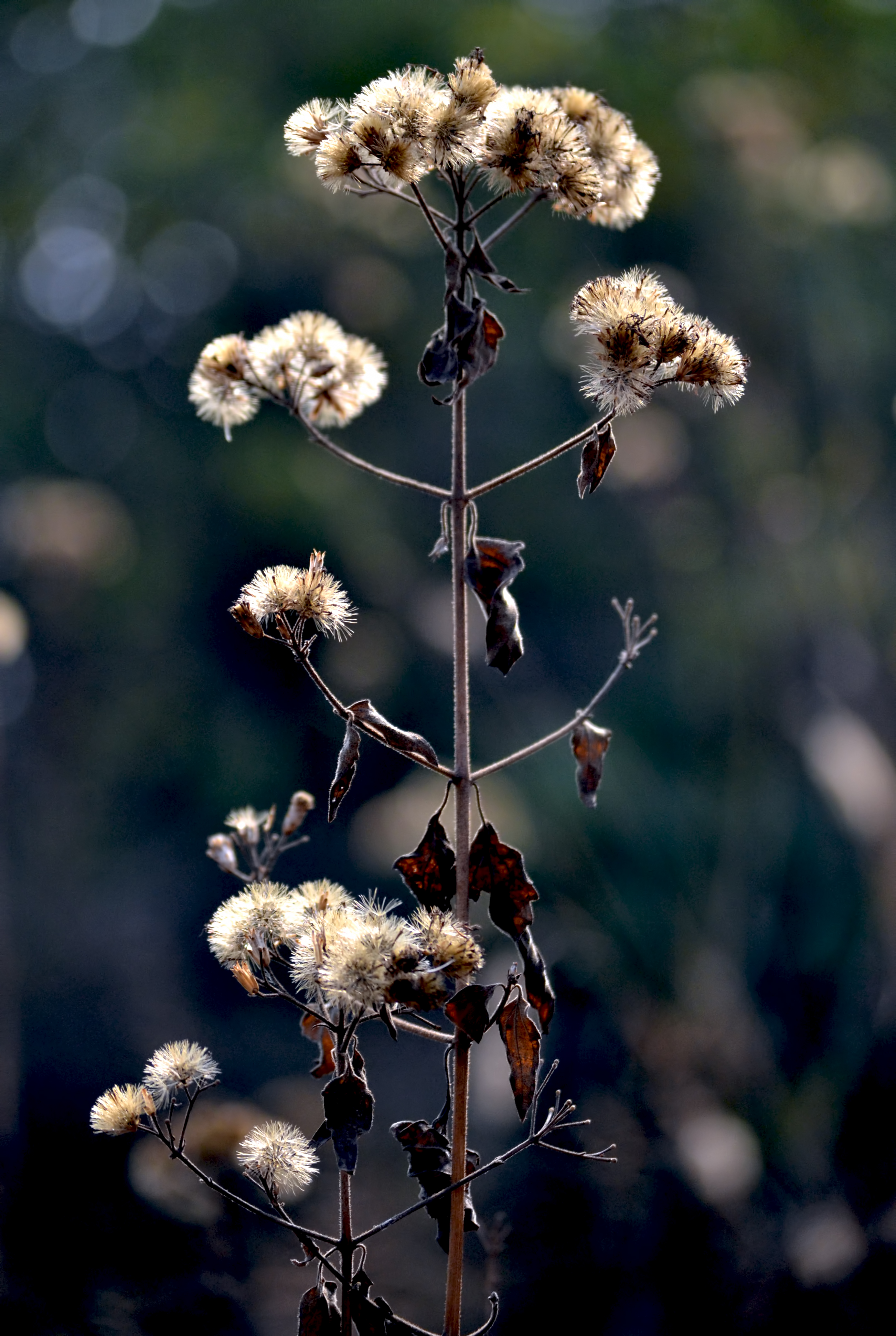 കമ്മ്യൂണിസ്റ്റ്‌ പച്ചയുടെ, ഉണങ്ങിയ പൂവ്